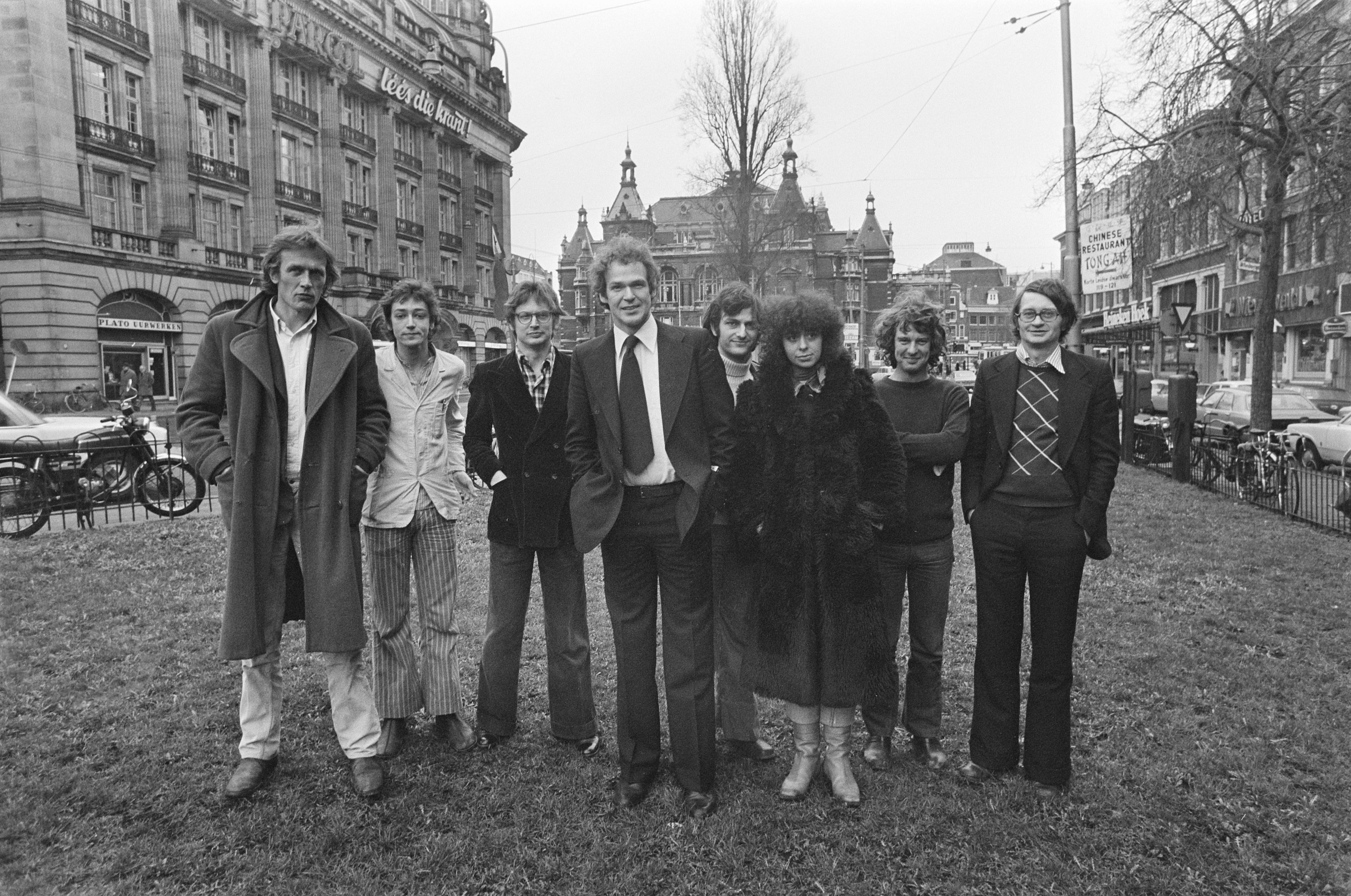 Persconferentie rond film "Alle dagen feest" in Amsterdam. V.l.n.r. de regisseurs Otte Jongerius, Orlow Seunke, Ate de Jong en Paul de Lussanet, scenarioschrijver Guus Luijters en schrijver Remco Campert. Daarvoor Peter Faber en Marcelle Meuleman. 26 januari 1976